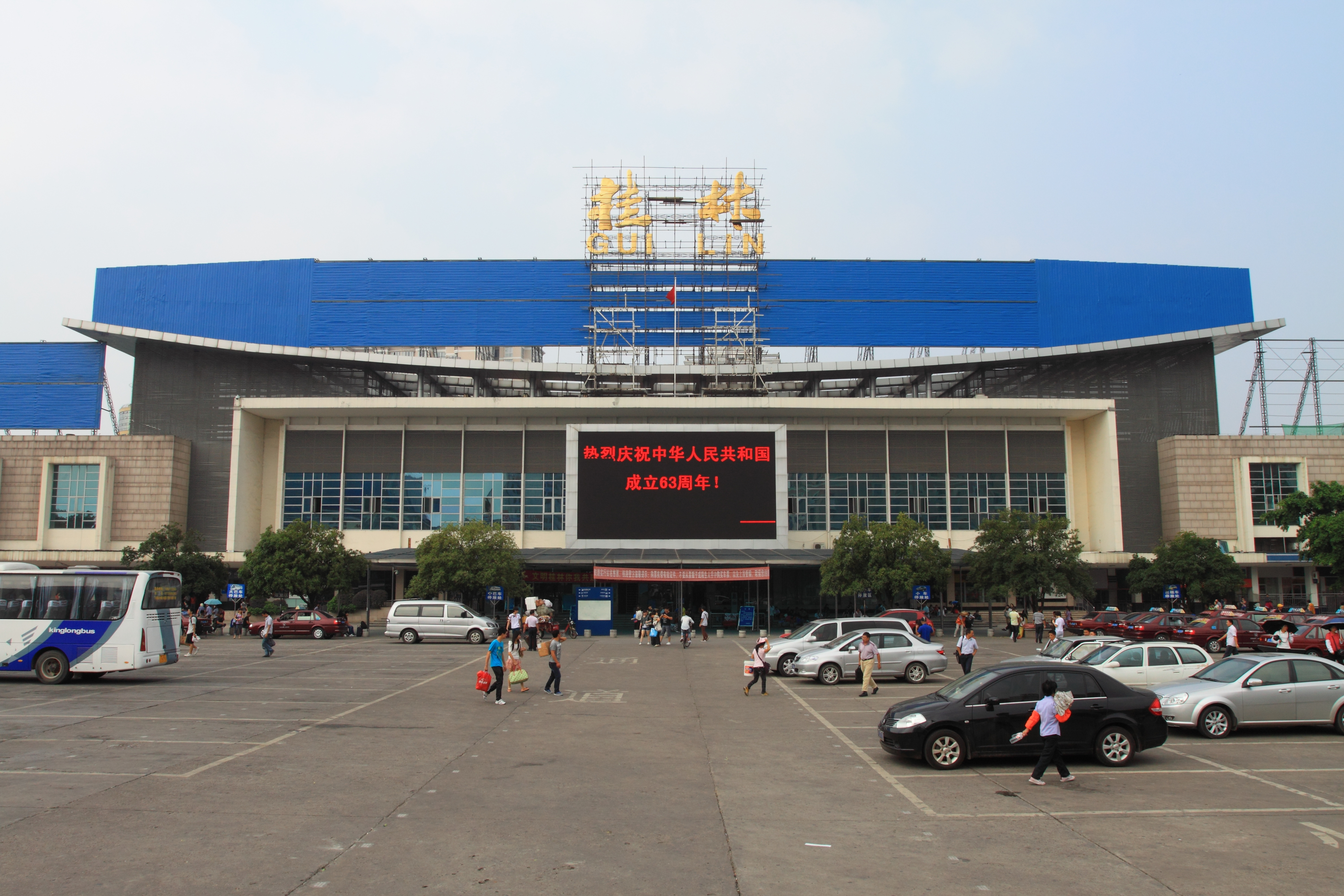 桂林站